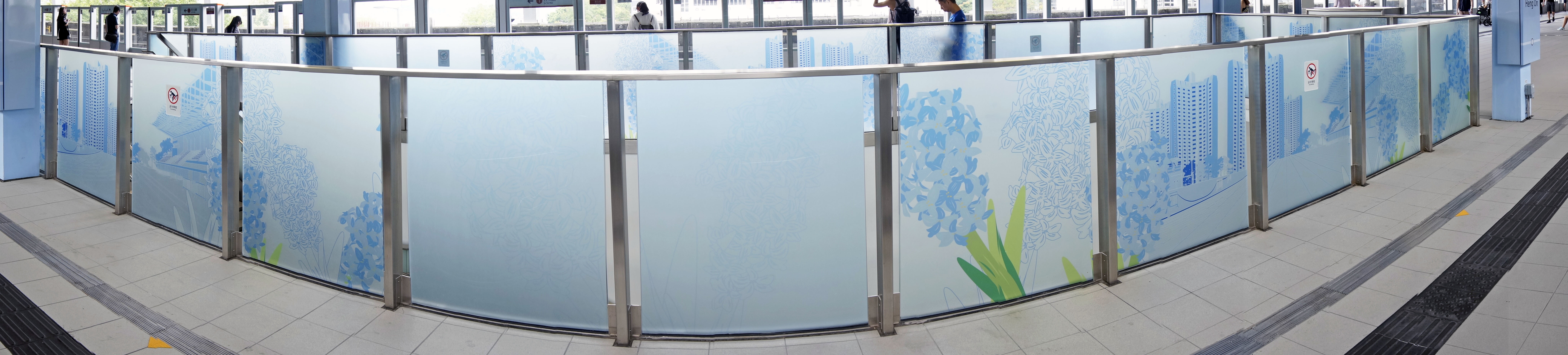 港鐵恆安站月台佈置全景圖